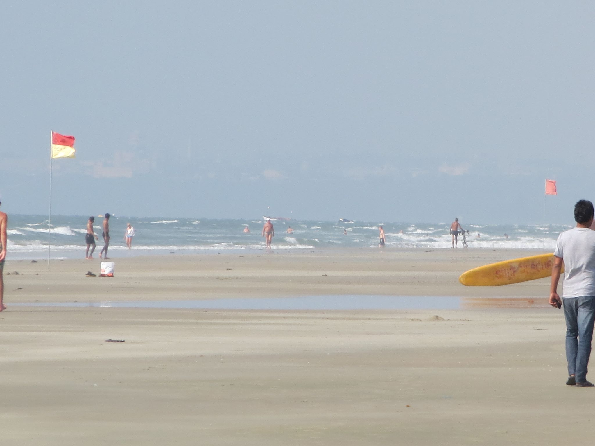 Мираж в небе над морем.Штат ГОА.